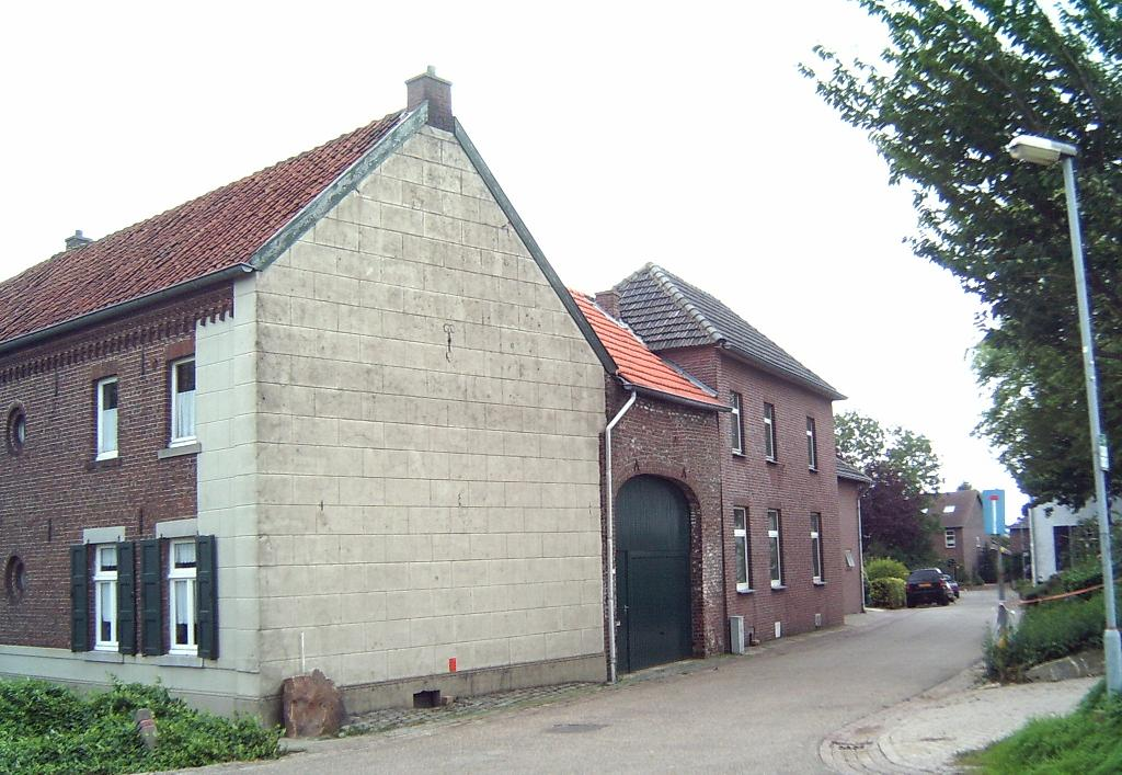 Limburgs: Haof in Dolberg bie Klumme